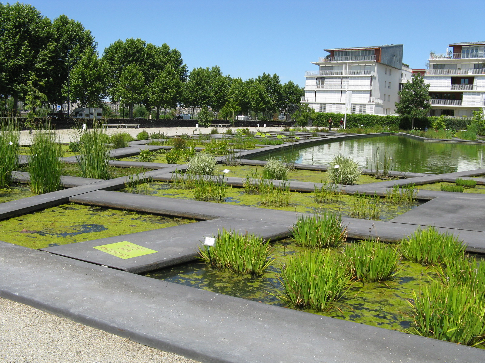 Bordeaux: Jardin Botanique 15